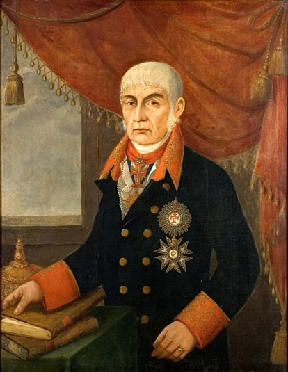 O médico pernambucano José Correia Picanço, primeiro e único barão com grandeza de Goiana (1745 - 1823)